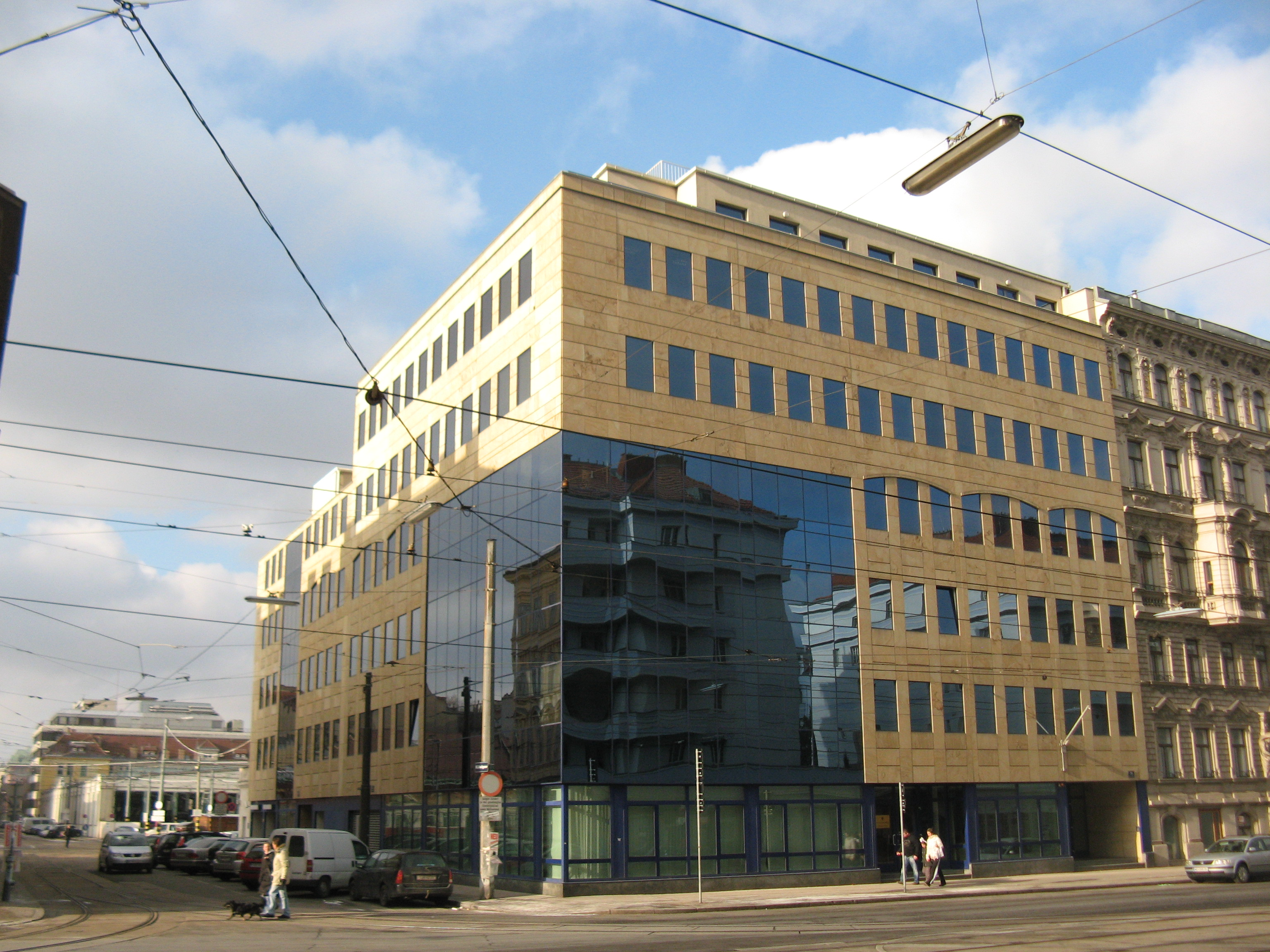 Asylgerichtshof, Laxenburger Straße 36, Wien-Favoriten